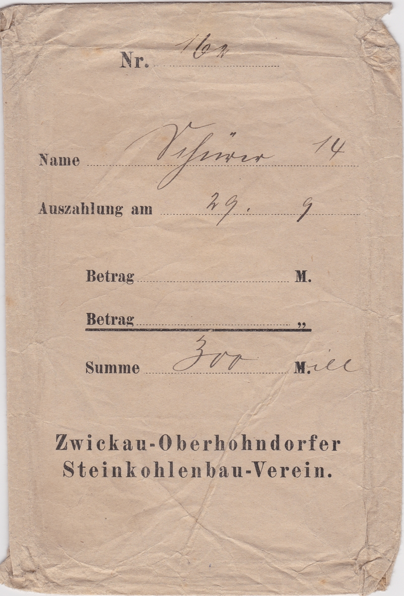 Lohntüte des beim Zwickau-Oberhohndorfer Steinkohlenbau-Vereins beschäftigten Bergmannes Schürer 14 aus der Inflationszeit. Auszahlung am 29. September: 300 Millionen Reichsmark. Zwickau, Sachsen, Deutschland.